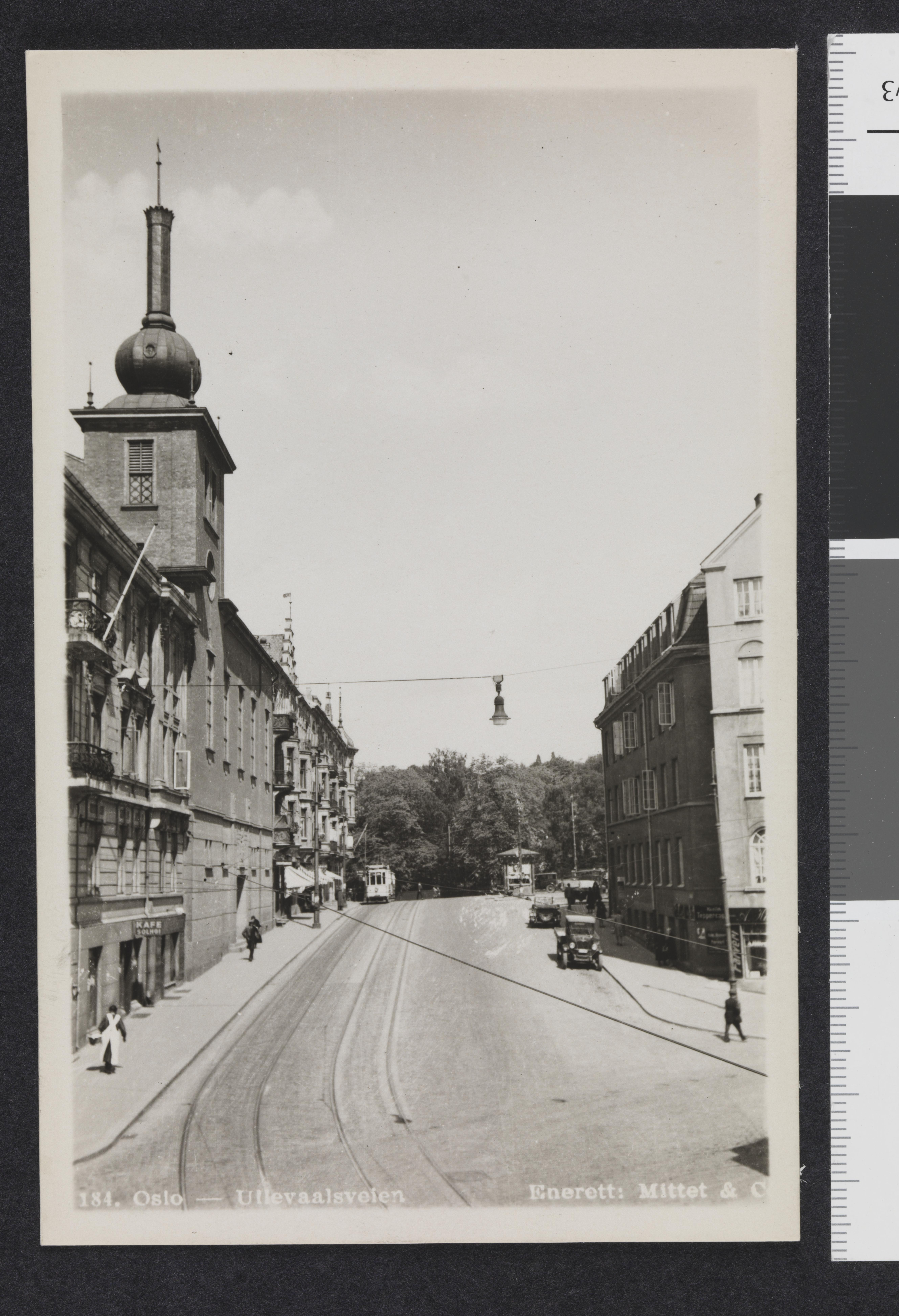 Bildet er hentet fra Nasjonalbibliotekets bildesamling St. Hanshaugen,Ullevålsveien, Oslo, Oslo